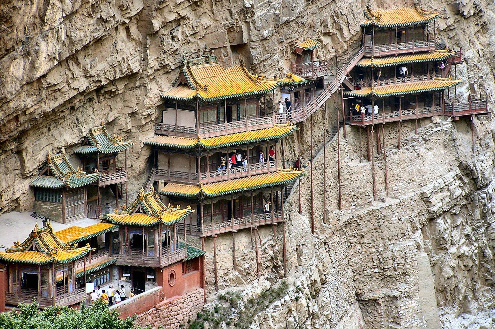 monastere suspendu de Xuankong (sud-est Datong, Chine)